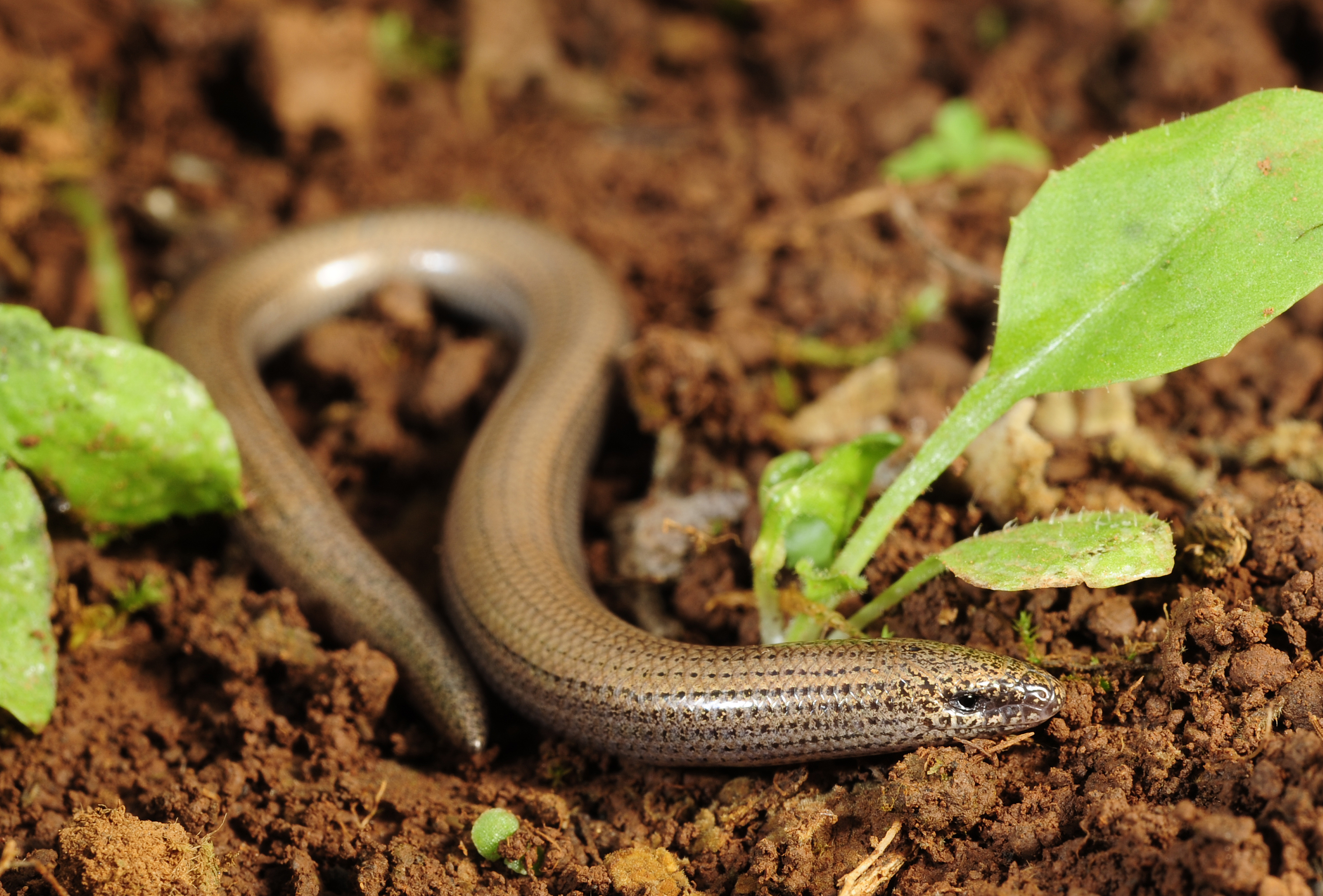 Gesprenkelter Schlangenskink (Ophiomorus punctatissimus) vom Peloponnes in Griechenland